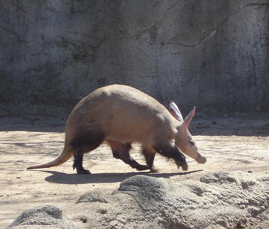 An aardvark at Detroit Zoo